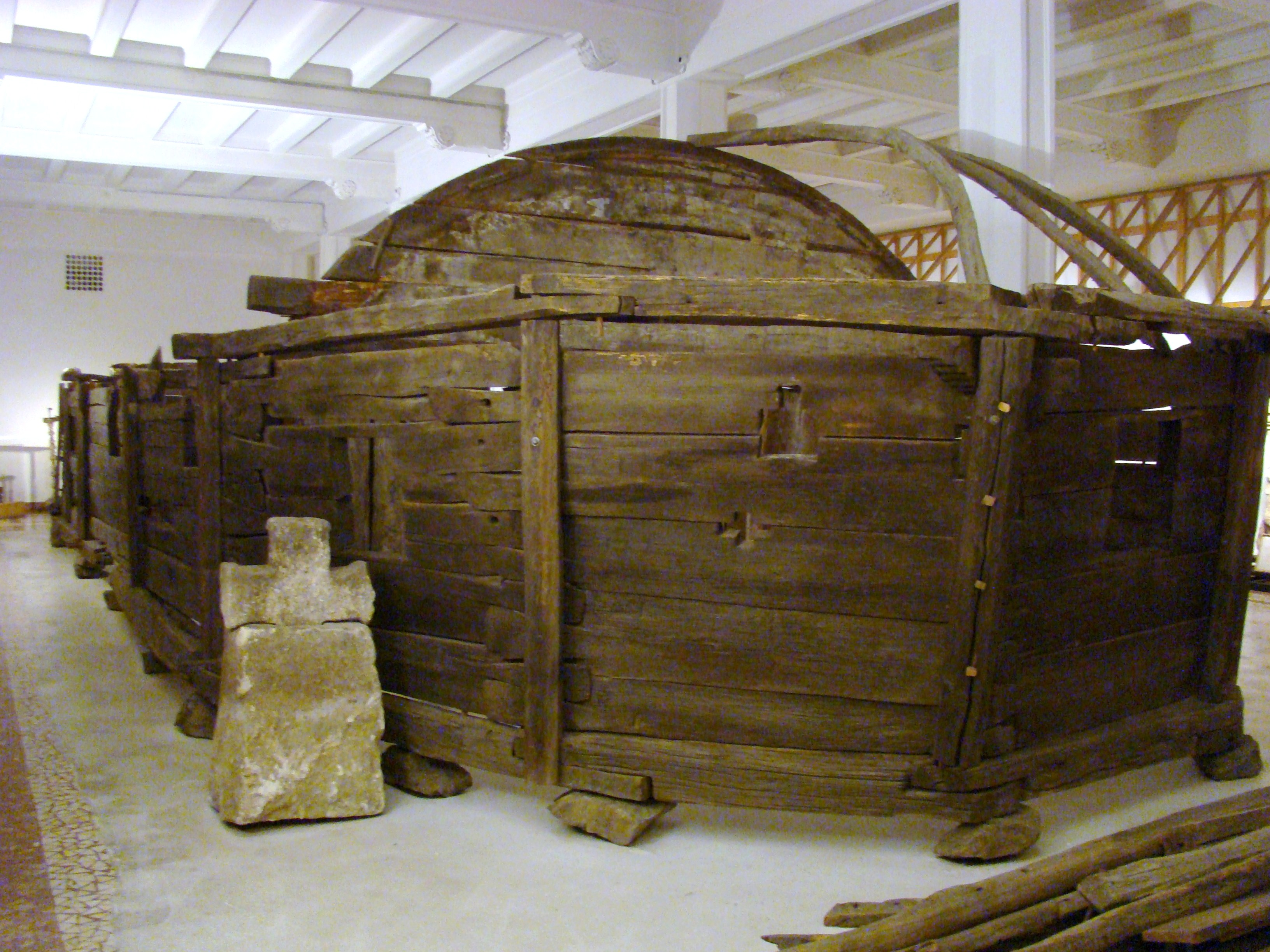 Biserica de lemn din Mintia, Hunedoara, mutată în incinta Muzeului Țăranului Român din București